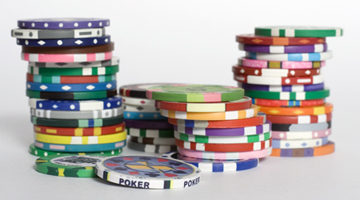 Фишки для покера